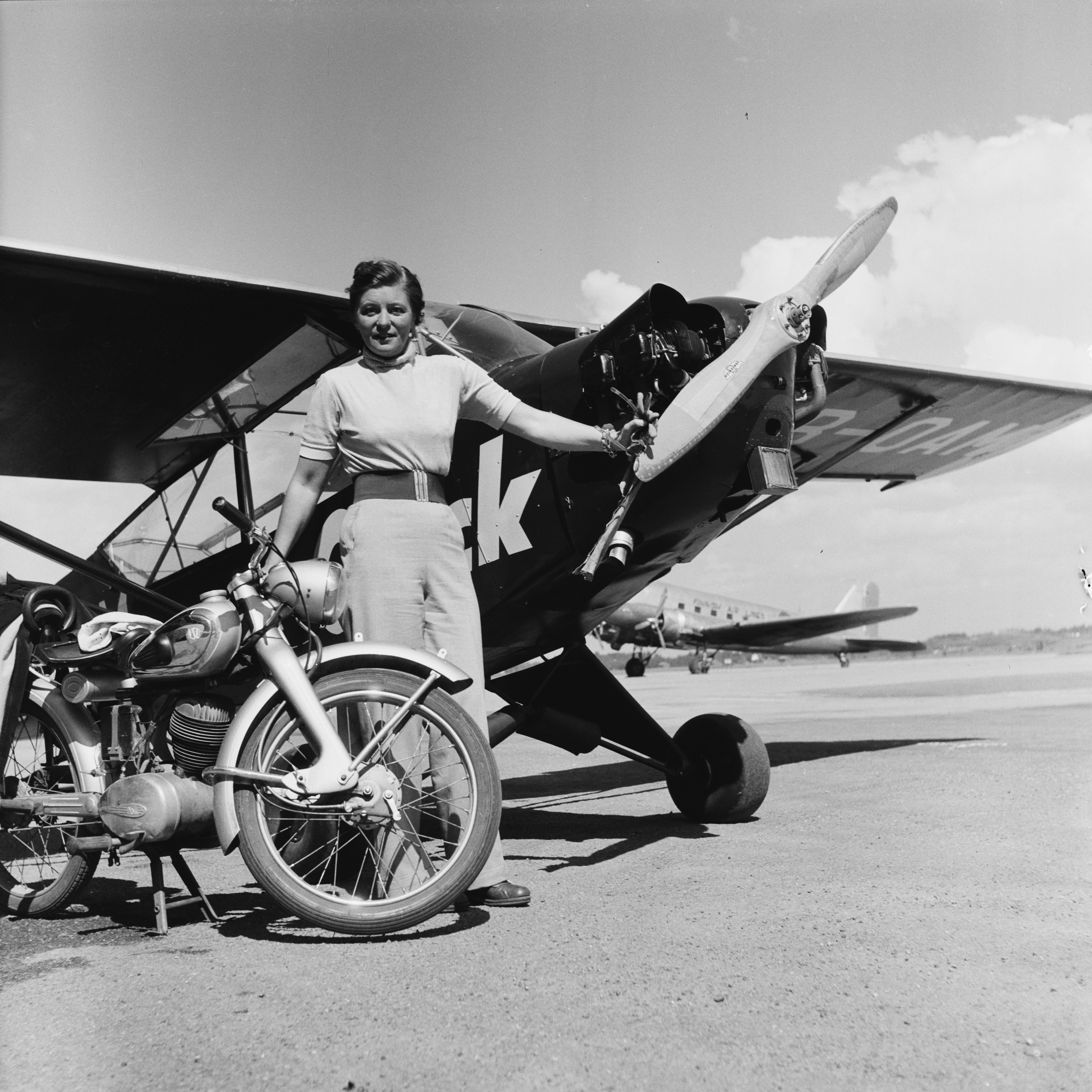 Helsingin olympialaiset 1952. -- Helsingin olympialaiset 1952. Saksalaisen Quick-lehden pienkone Malmin lentokentällä. Kuvassa todennäköisesti Elly Beinhorn "lentävä reportteri\". Beinhorn saavutti jo ennen toista maailmansotaa kuuluisuutta eräänä taitavista saksalaista lentäjänaisista. Koska hän halusi jatkaa lentämistä myös sodan jälkeen, joutui hän Saksan lentokiellon takia ostamaan koneen Sveitsistä (kuvan amerikkalaisvalmisteisen Piper J-3C-65 Cub -koneen, rekisteritunnukseltaan HB-OAM) ja lentämään sillä, kunnes pystyi rekisteröimään koneen Saksan rekisteriin. Koneen vierellä saksalainen NSU Fox -moottoripyörä. -- negatiivi, filmi, mv